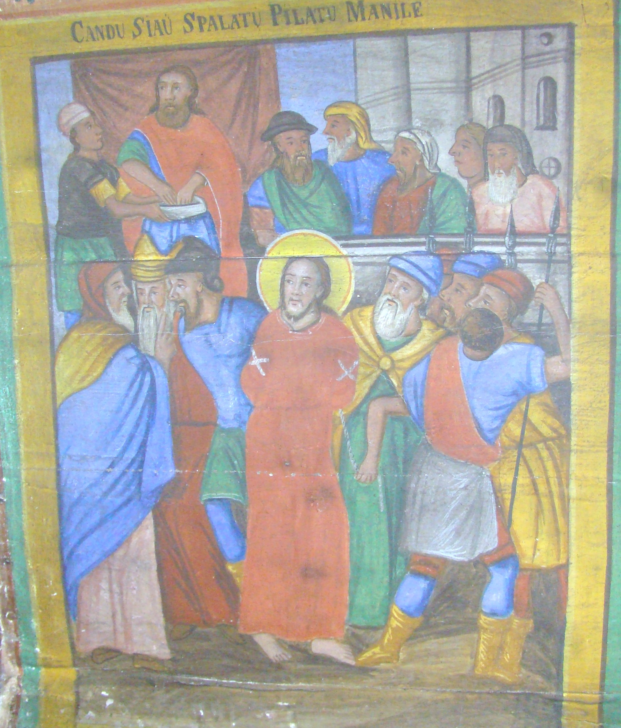 Biserica de lemn „Sfinții Arhangheli Mihail și Gavriil” din Țărmure, județul Arad